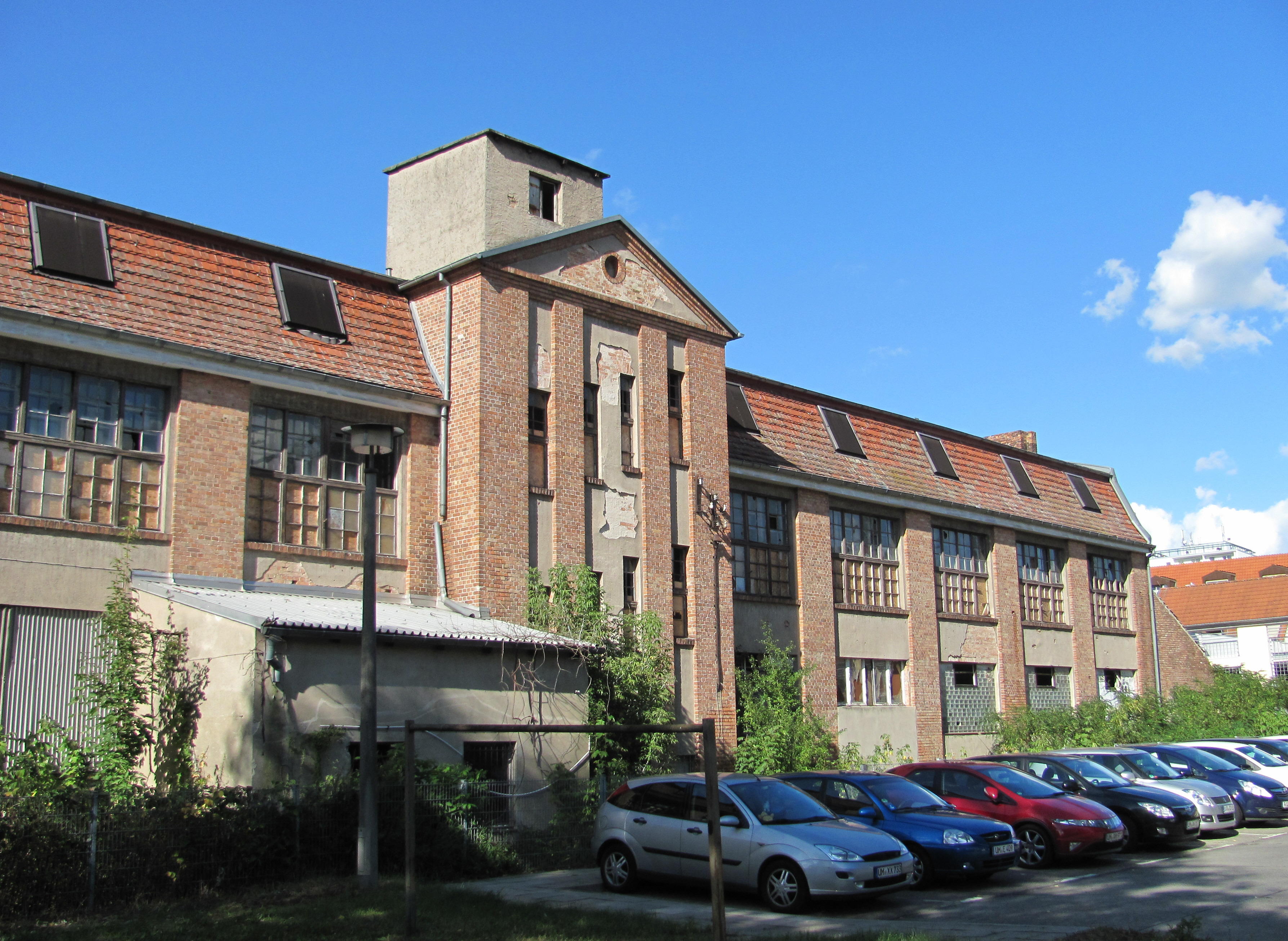 Ehemalige Zigarettenfabrik "Dieterle" in der Th.-Neubauerstraße 12 Schwedt, Denkmalliste Nr. 21